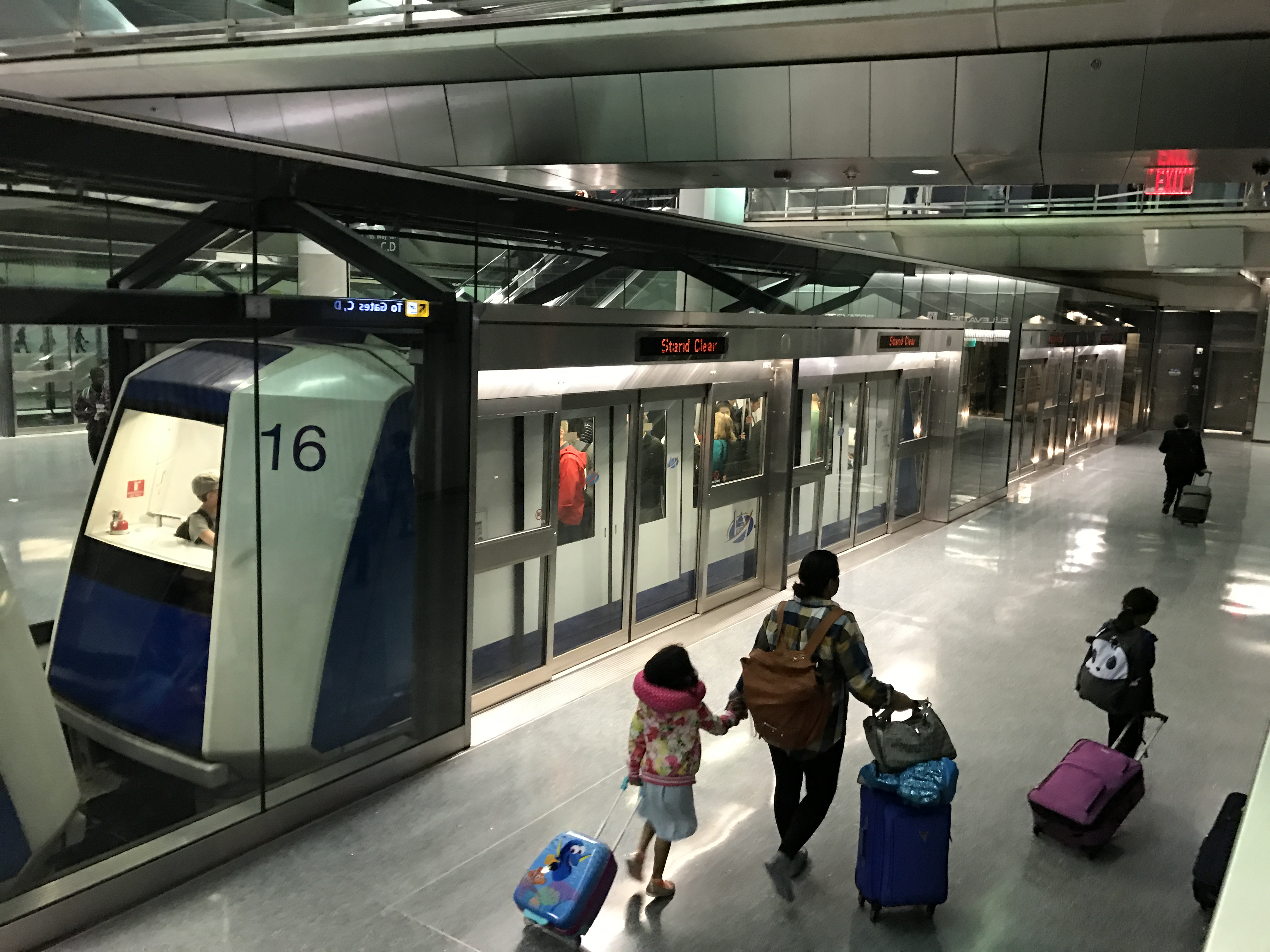 Tren interterminales en el Aeropuerto Internacional de Washington Dulles.